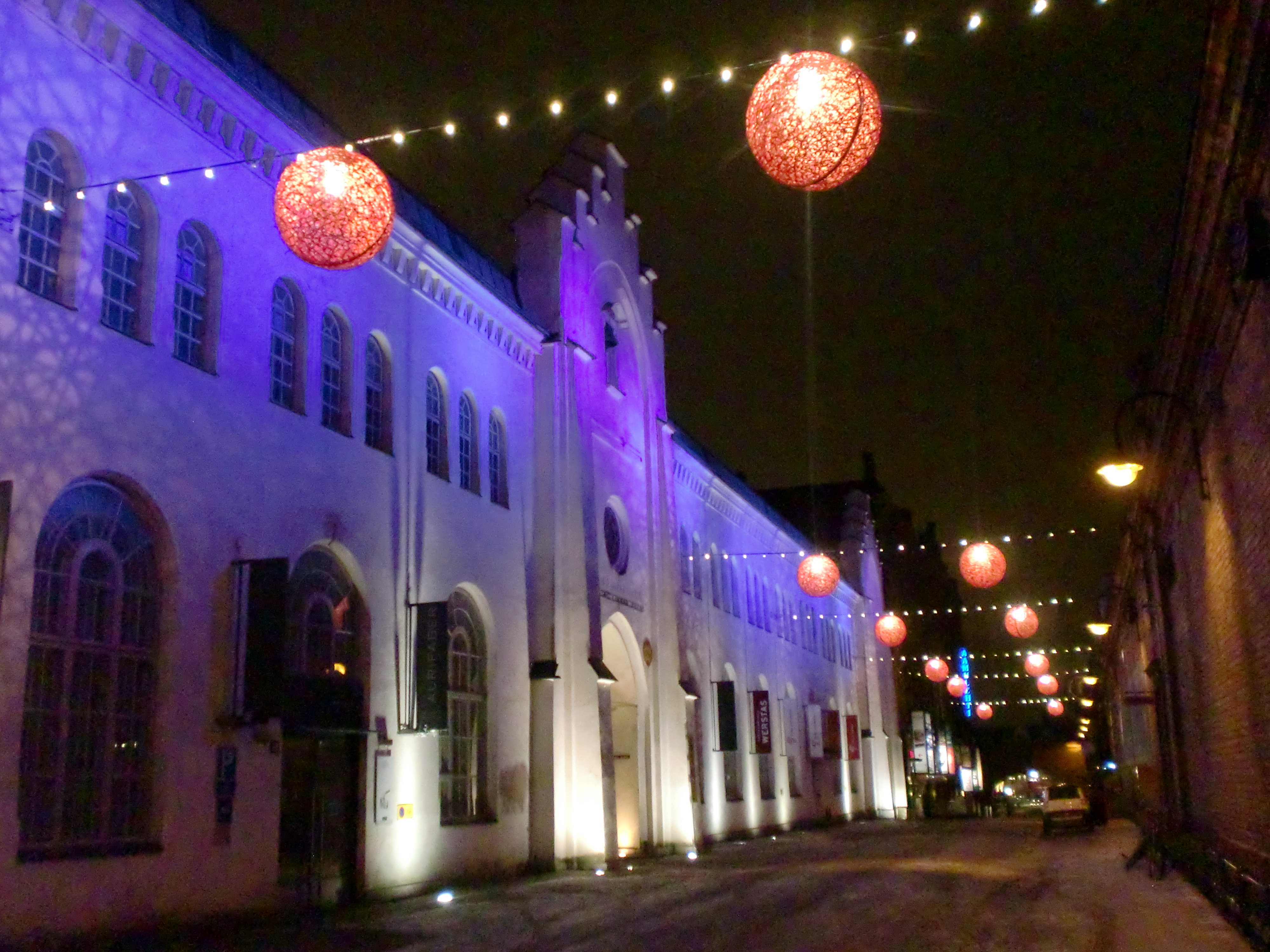 Finlaysonin tehdasalue; historiallinen tehdasalue Tampereella